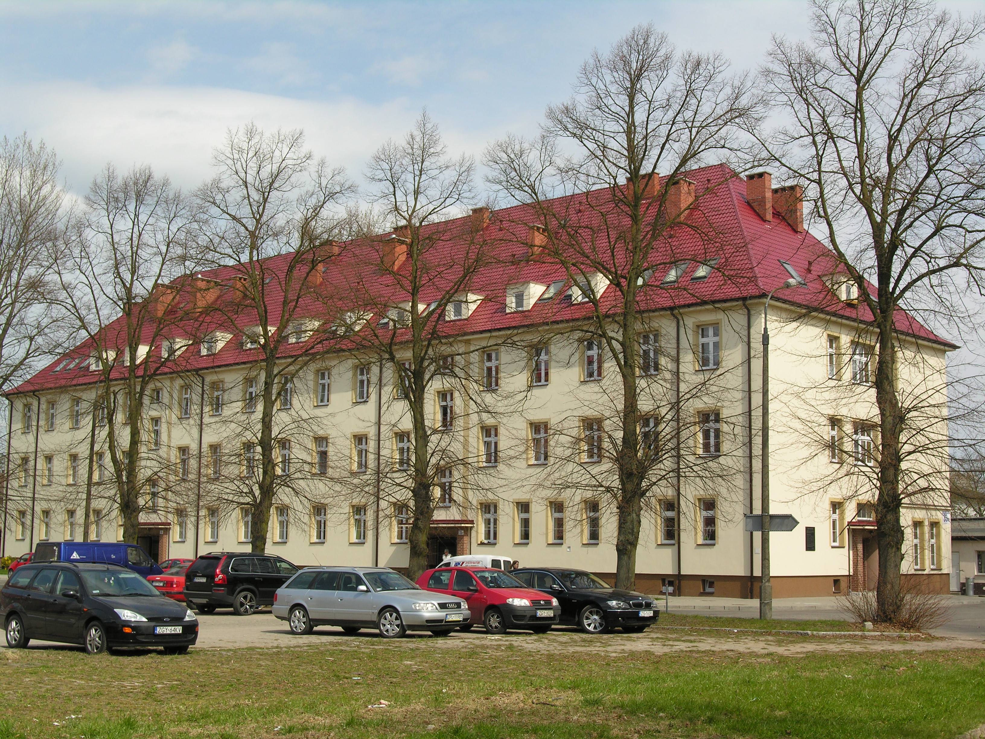 dawne koszary w Gryficach